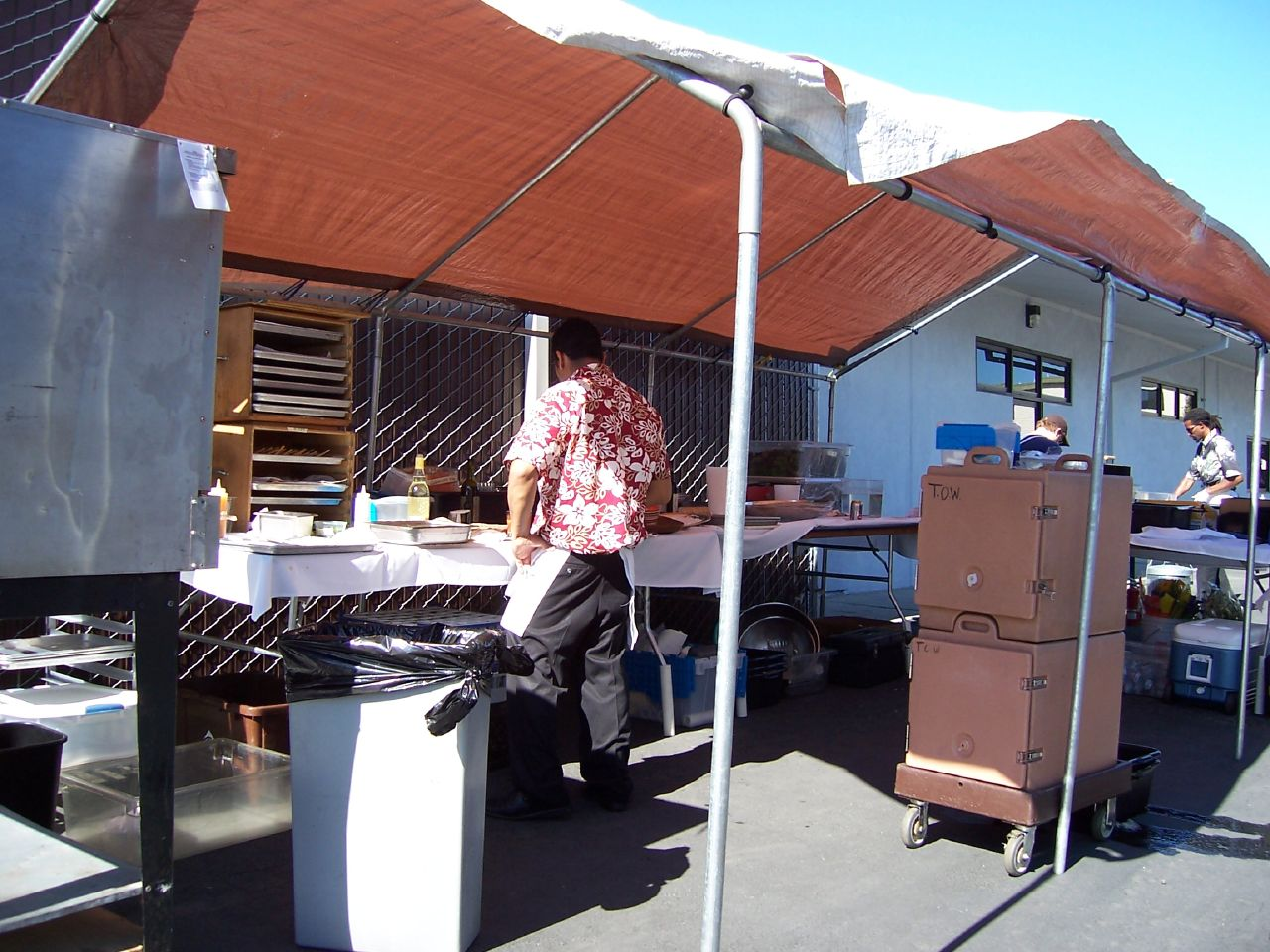 צוות הסעדה מכין ארוחה בתנאי שטח.